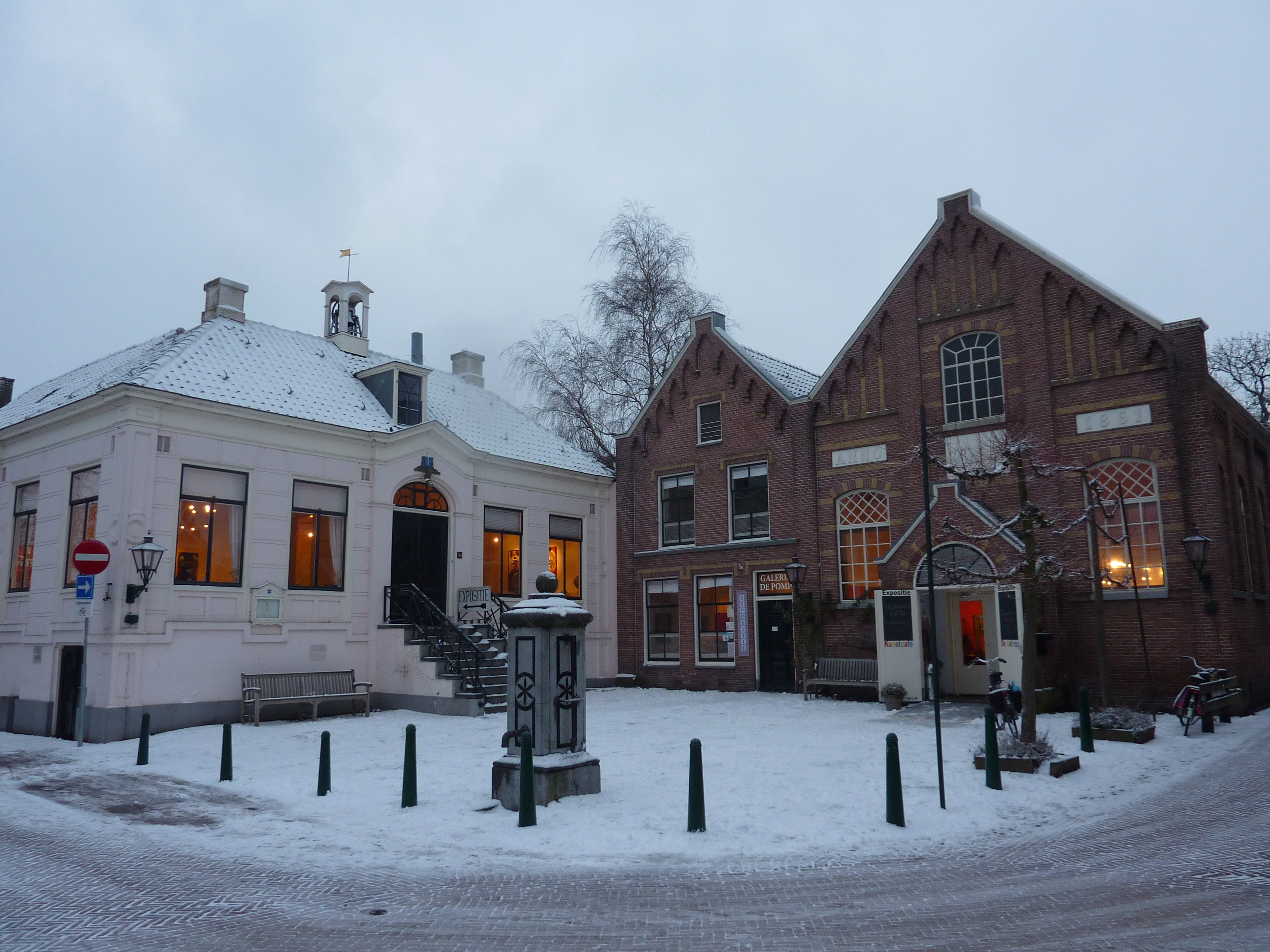 Warmond, plein met pomp